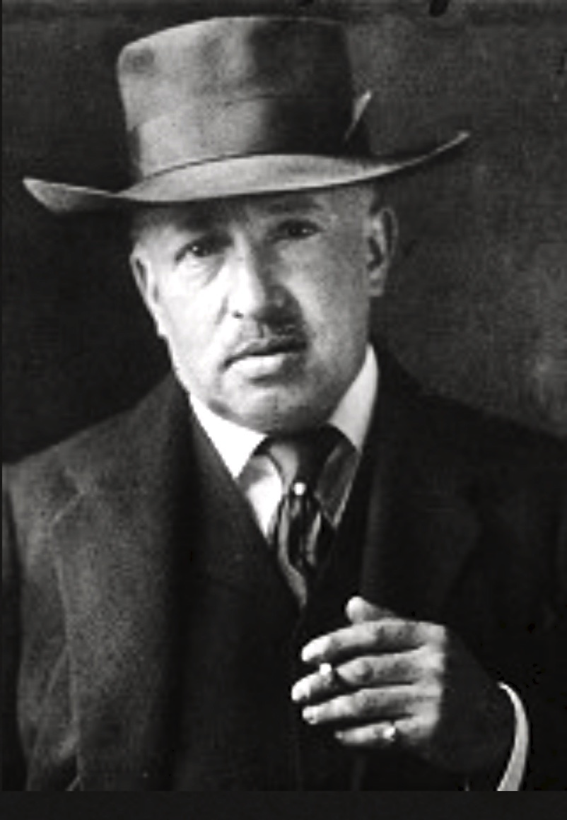 Der Verleger Samuel Fischer (1859–1934)